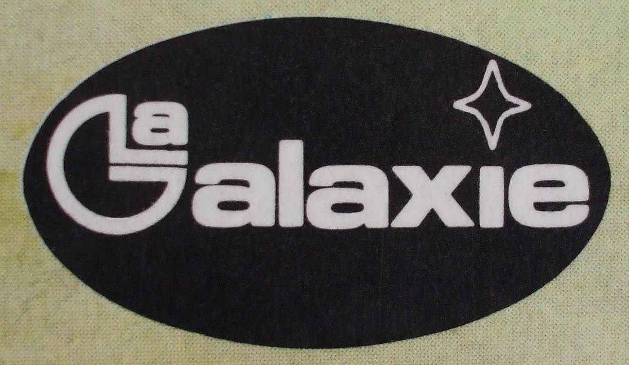 la galaxie